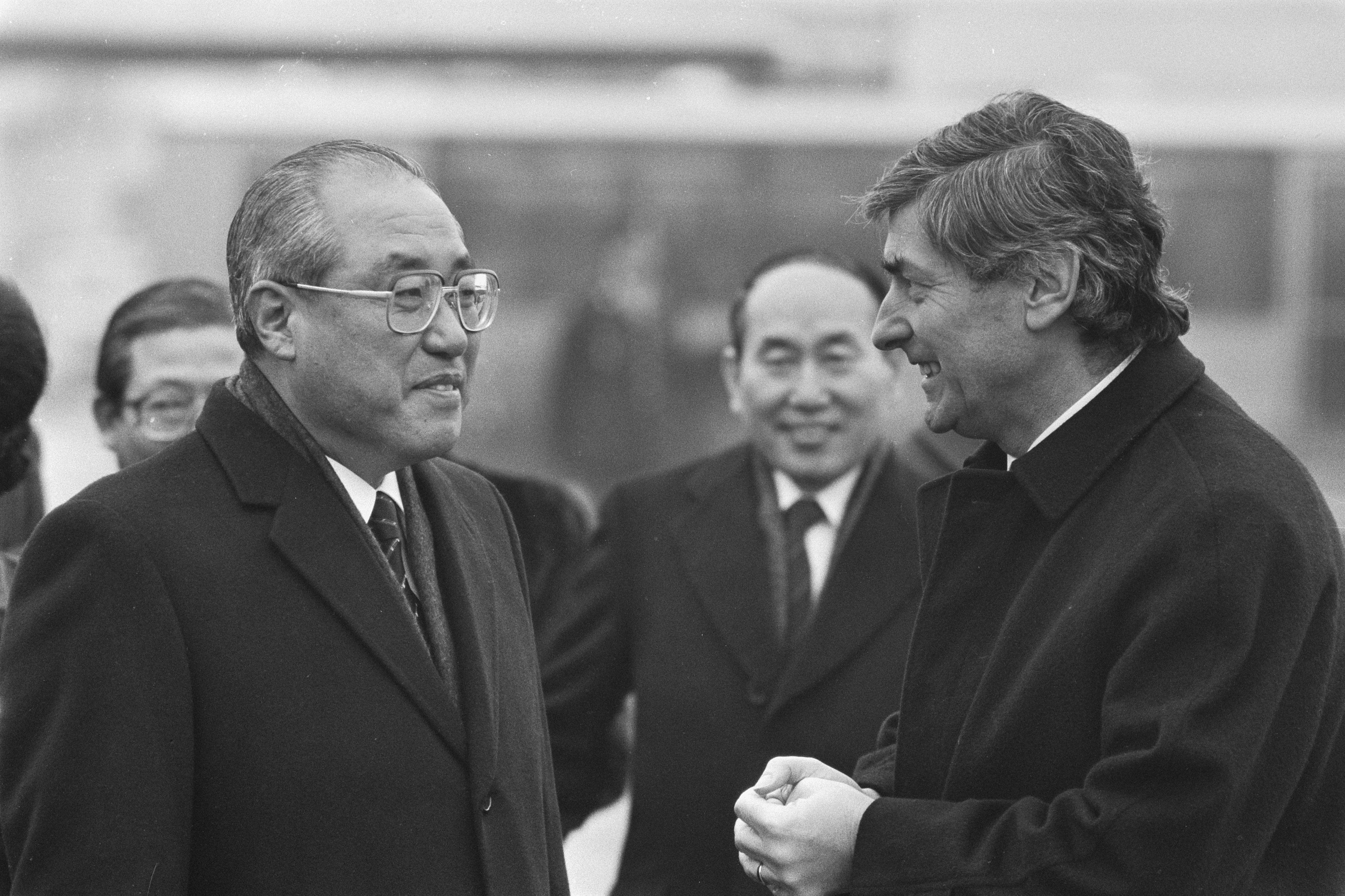 Collectie / Archief : Fotocollectie Anefo Reportage / Serie : [ onbekend ] Beschrijving : Aankomst premier Shinyong Lho van Zuid Korea op Schiphol rechts premier Lubbers Datum : 20 januari 1987 Locatie : Noord-Holland, Schiphol Trefwoorden : aankomsten Persoonsnaam : Lubbers, Ruud, Premier Shinyong Lho Fotograaf : Croes, Rob C. / Anefo Auteursrechthebbende : Nationaal Archief Materiaalsoort : Negatief (zwart/wit) Nummer archiefinventaris : bekijk toegang 2.24.01.05 Bestanddeelnummer : 933-8659